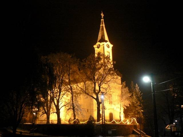 A kislődi Szent József és Szent Vendel Római Katolikus templom